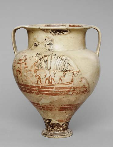 Vinbål importerad till Cypern från Grekland. Från en grav vid Enkomi. Sencyprisk II, ca 1450-1200 f Kr.